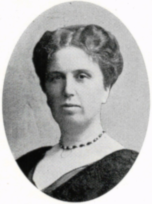 Gunhild Hasselrot , född Liljenroth 21 maj 1873, död 8 februari 1960, svensk ryttare ur Porträttgalleri från Södermanland 1934